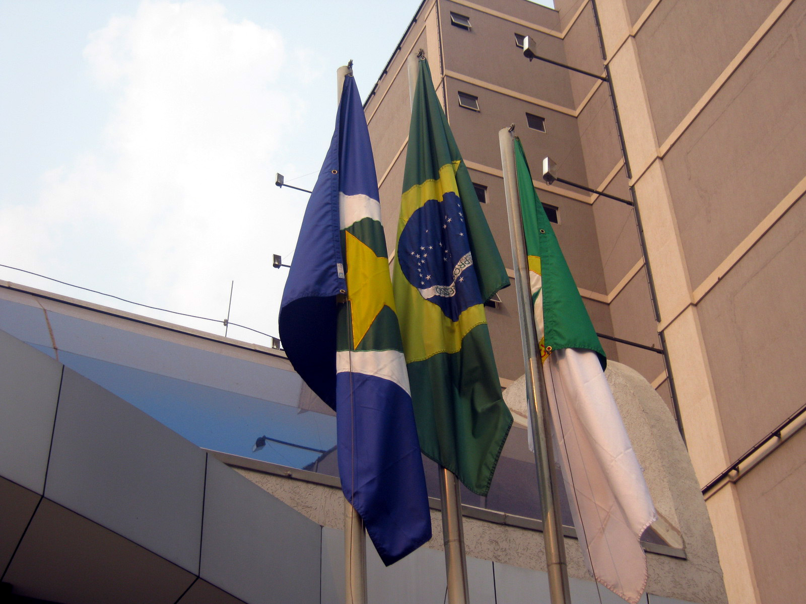 Bandeiras do Brasil (centro), estado do Mato Grosso (esquerda) e Cuiabá (direita)